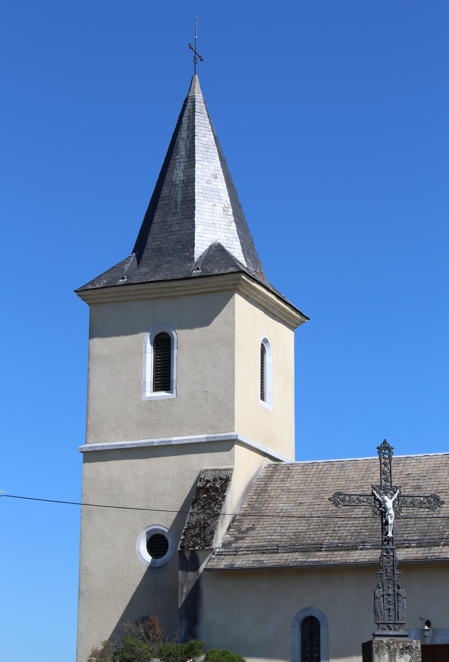 Église Saint-Martin de Sarlabous (Hautes-Pyrénées)